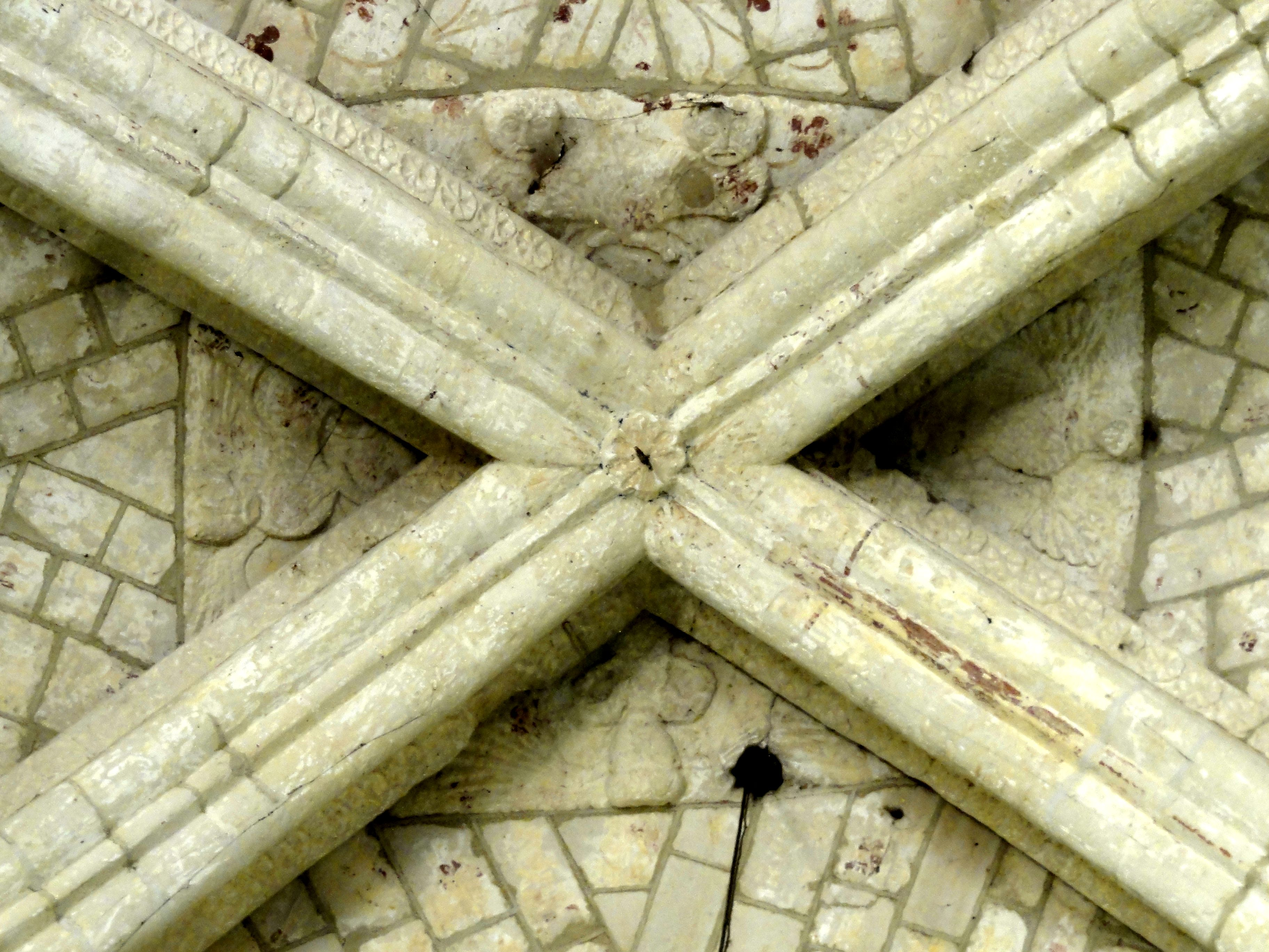 Chœur, clé de voûte de la première travée.